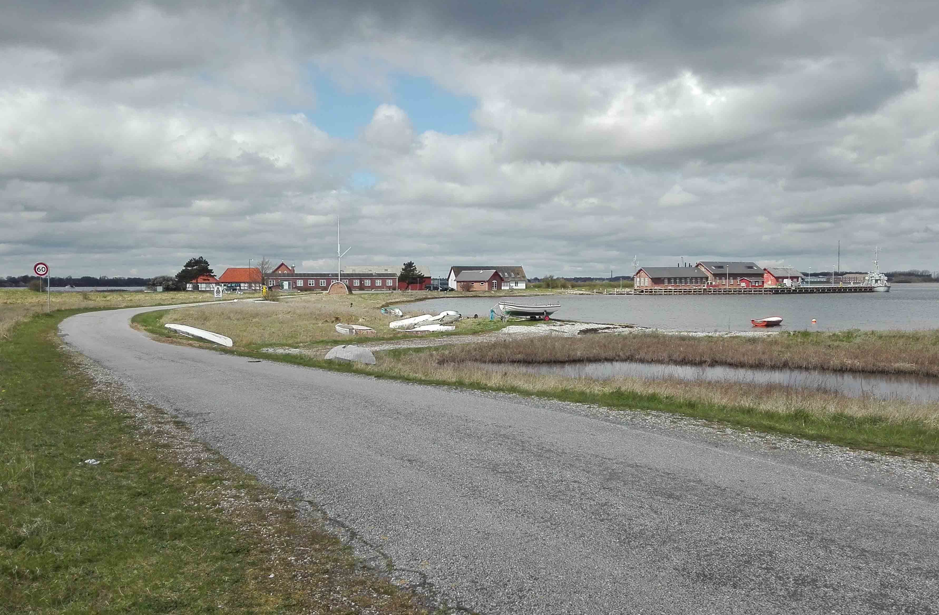 Slipshavn